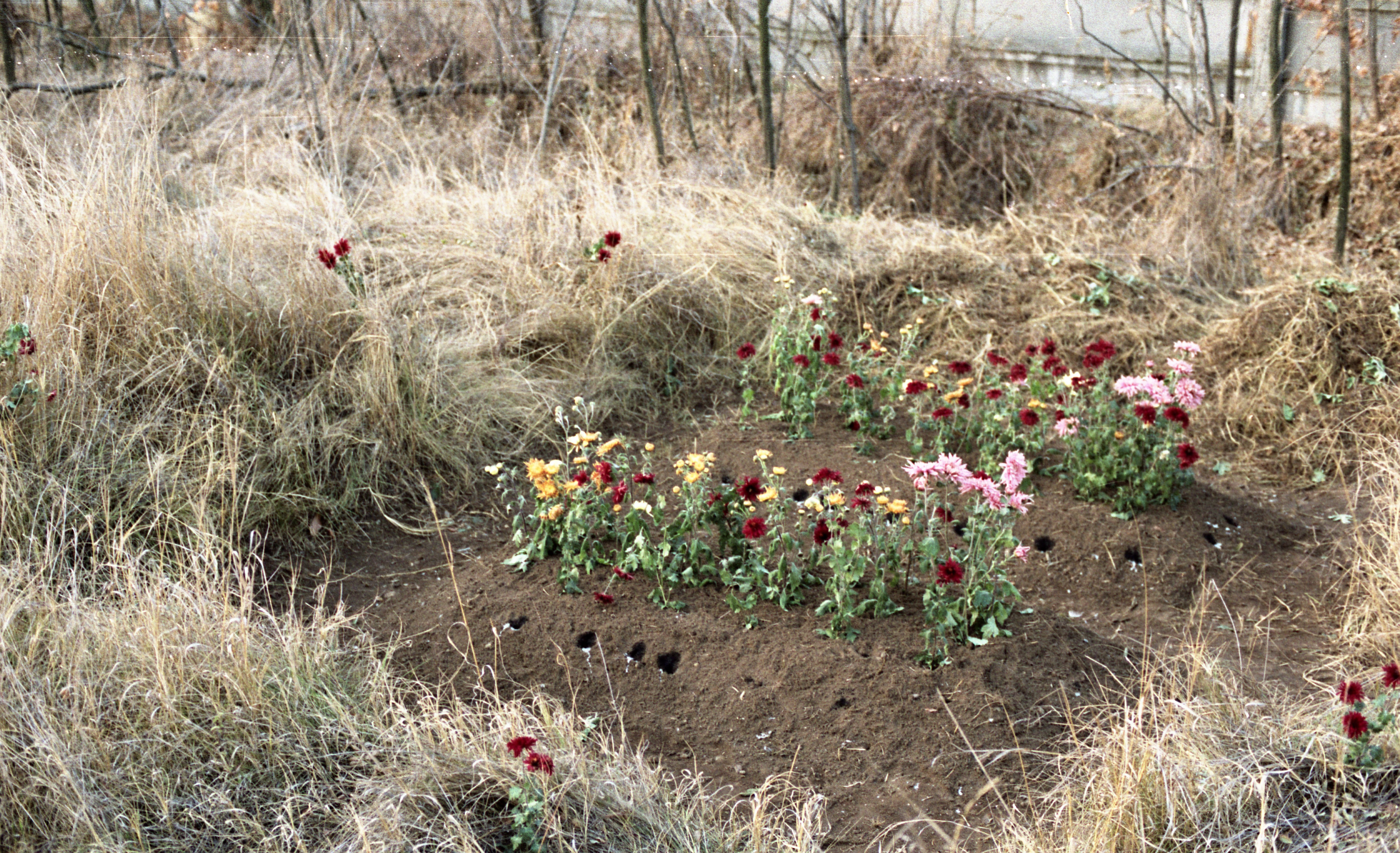 Új Köztemető, 301-es parcella. Location: Hungary, Budapest X. Tags: colorful, grave, Budapest, cemetery Title: Új Köztemető, 301-es parcella.